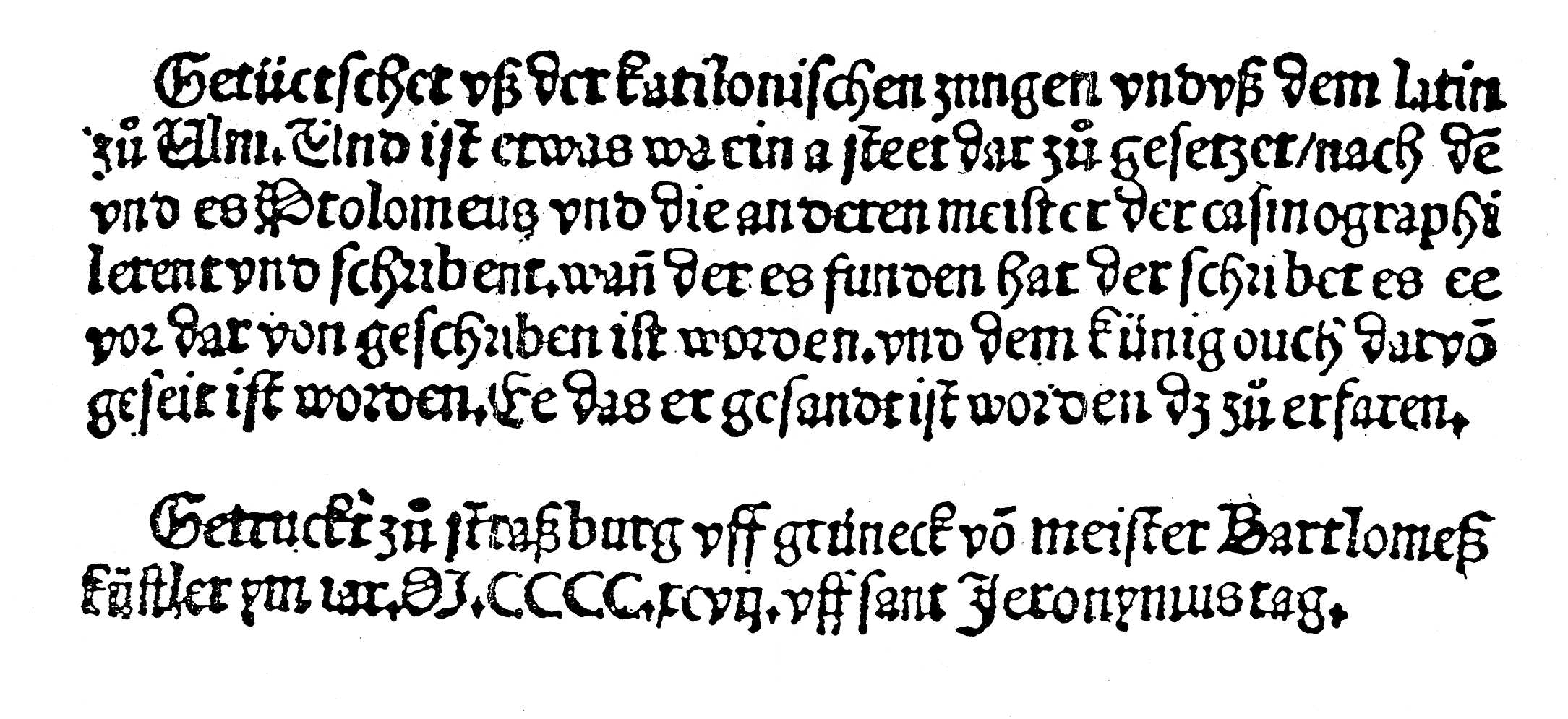 Verdeutscht aus der katalonischen Sprache un dem Latein zu Elm. Und ist etwas was er dazugensetzt hat zu dem was Ptolomäus und andere Meister der Kartenkunde lehrten und schrieben. Als der es gefunden hat, hat der geschrie3ben ehe davon geschrieben worden ist und dem König auch davon gesagt worden ist. Ehe dass er gesandt worden ist. Ehe daß er gesandt worden ist es zu erfahen. Gedruckt is Straßburg von Meister Bartomeß, Künstler im Jahre 1497 amb Jeronymustag.